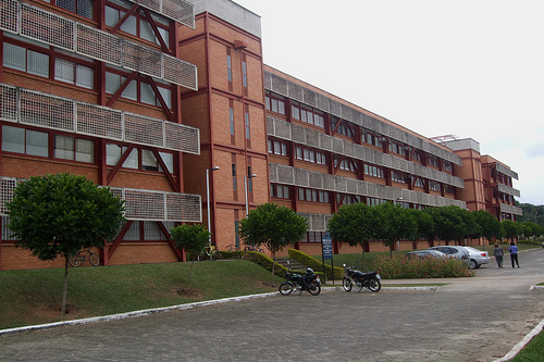 Foto do imponente edifício do Centro de Ciências Exatas da Universidade Federal de Viçosa, onde se localiza o Departamento de Informática da UFV.